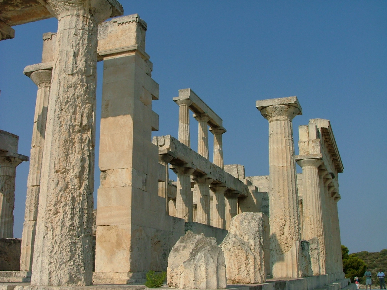 Templo de Afaia en la isla de Egina (Grecia).